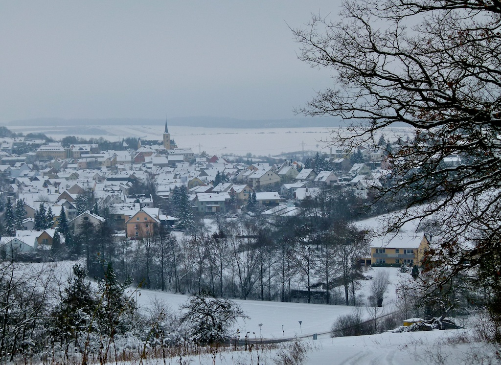 Cool Güntersleben